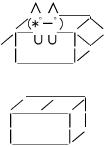 四大AAのしぃ。PNG